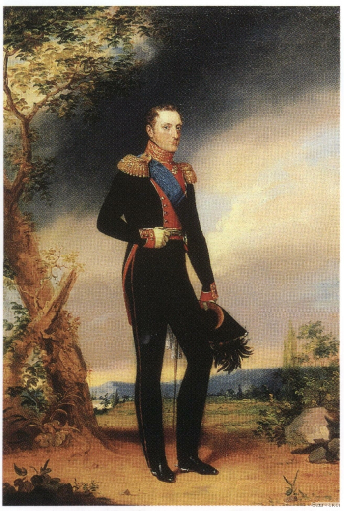 Портрет императора Николая I Portrait of Emperor Nicholas I 1828 Холст, масло. 86 х 59 Слева внизу, на камне, подпись и дата: Geo Dawe R. A. Pinxit St. Petersbourg 1828. На обороте холста мелом: 100-25; на подрамнике графитным карандашом: 86 х 60; синим карандашом: № 35; черным карандашом: 100-25; красным карандашом: 8401/ Г. Р. М.; бумажный ярлык: Владимирскiй дворец С. П. Б. М 00073; штамп: Г. Р. М. инв. № 8401 (номер зачеркнут) Поступил: в 1935 из ГМР* (Ленинград) Ж-4598 Изображен в мундире лейб-гвардии Преображенского полка с орденами Святого Андрея Первозванного (лента и звезда), Святого Владимира (лента под мундиром и звезда) и Меча (шведский; в петлице). Авторское уменьшенное повторение 1821 - в ГЭ* (№ 5851). Авторские повторения 1826 - в ГИМ*** (№ И1-3895/ 91958), не подписанное и недатированное повторение - в ГЭ (№ 4451). Гравирован по пояс Т. Райтом, отпечатан в Лондоне 13 февраля 1826.